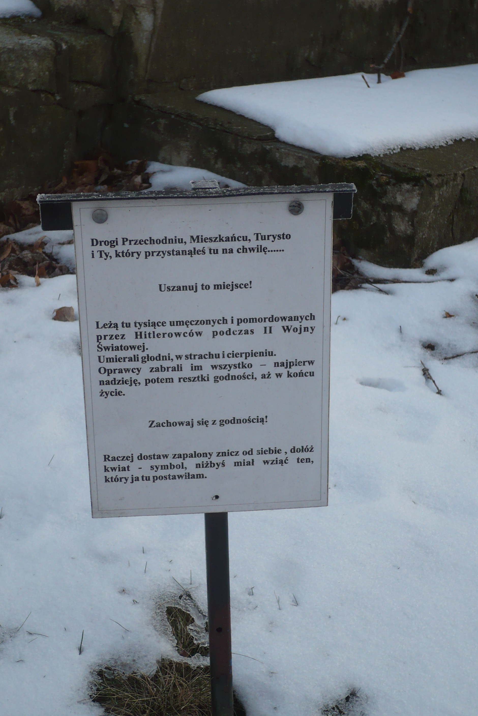 Walim. Cmentarz